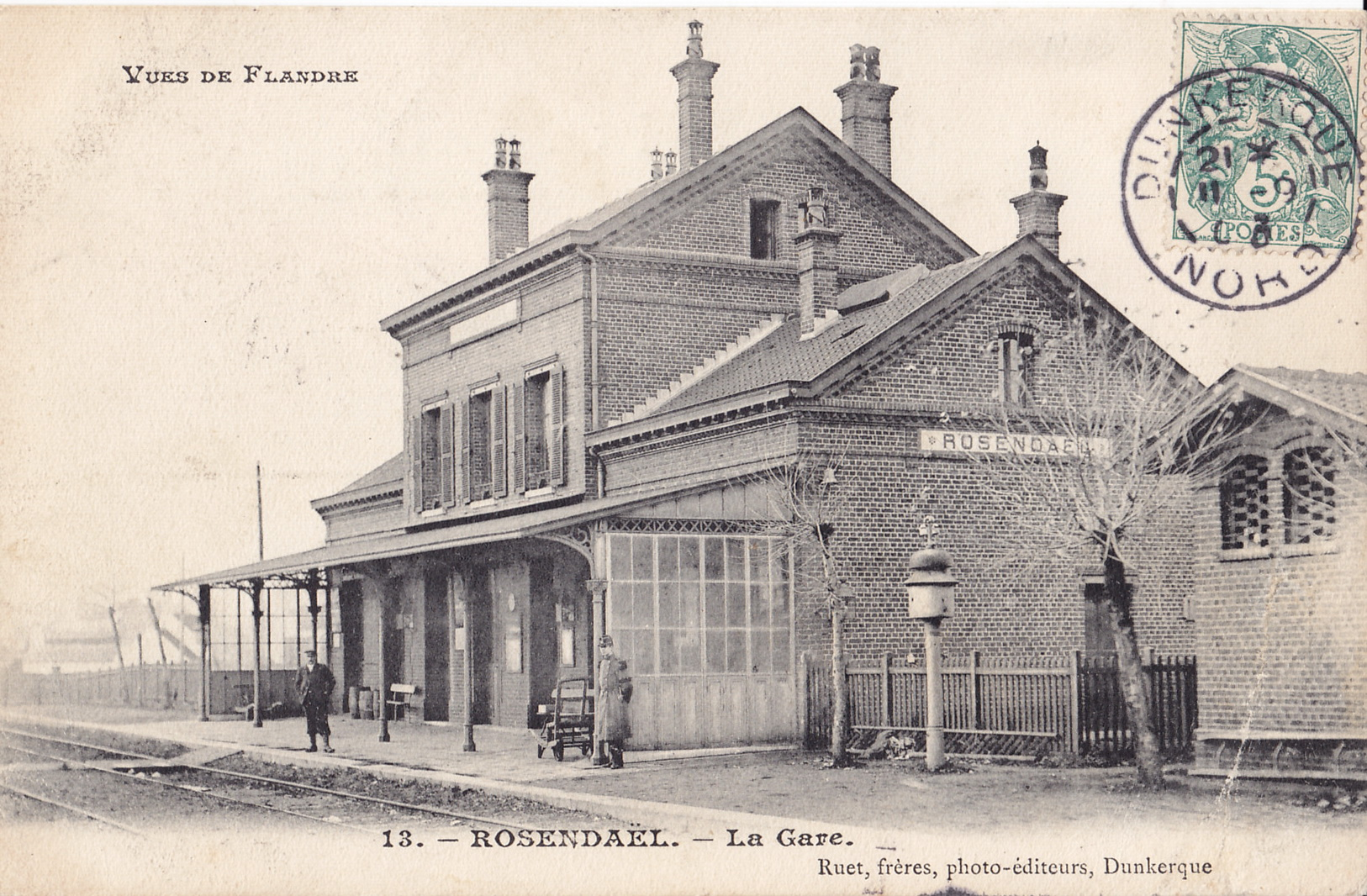 Carte postale ancienne éditée par Ruet à Dunkerque, collection Vues de Flandre, n°13 : ROSENDAËL - La Gare